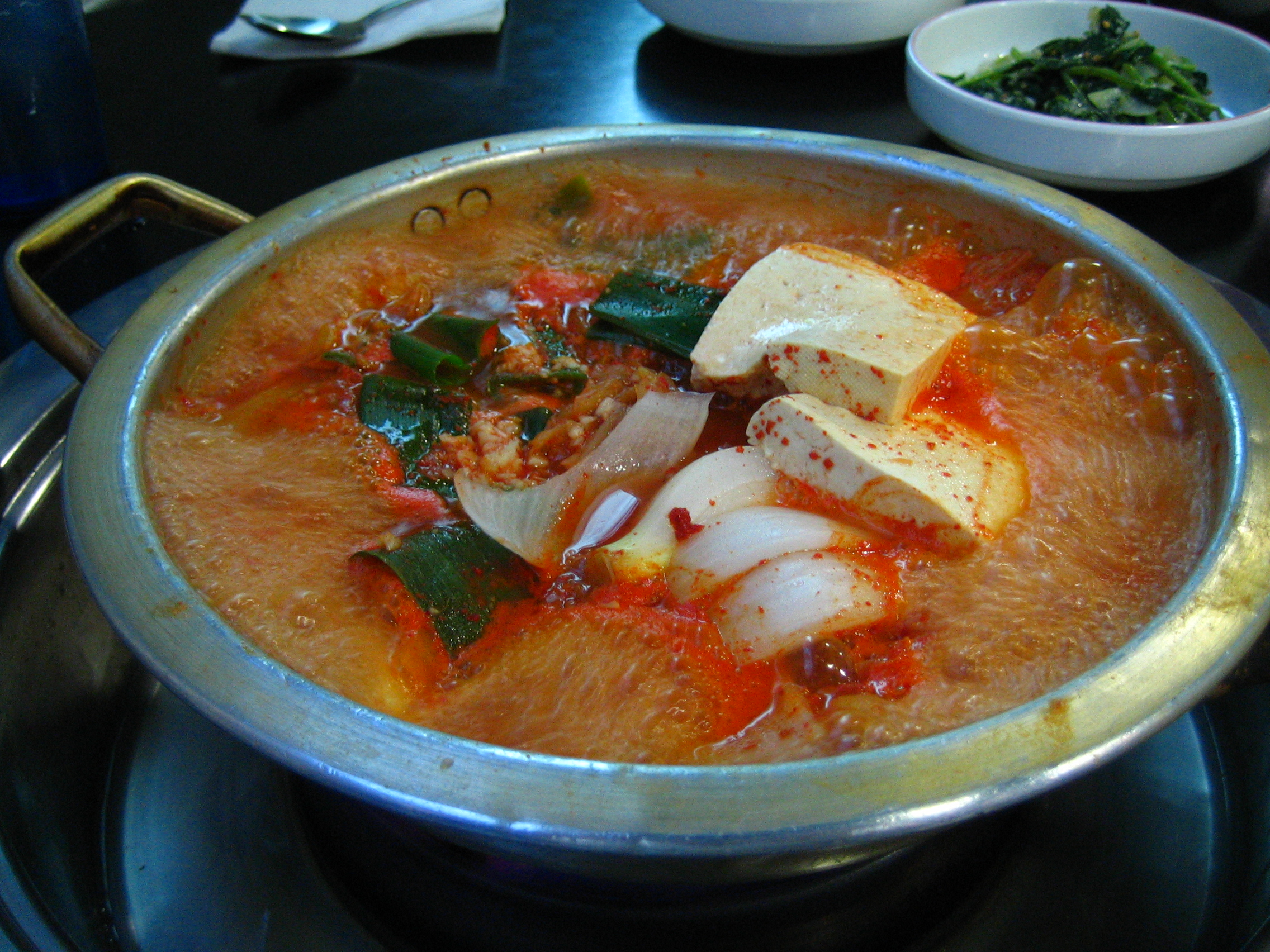 김치찌게, kimchi-jjiggae